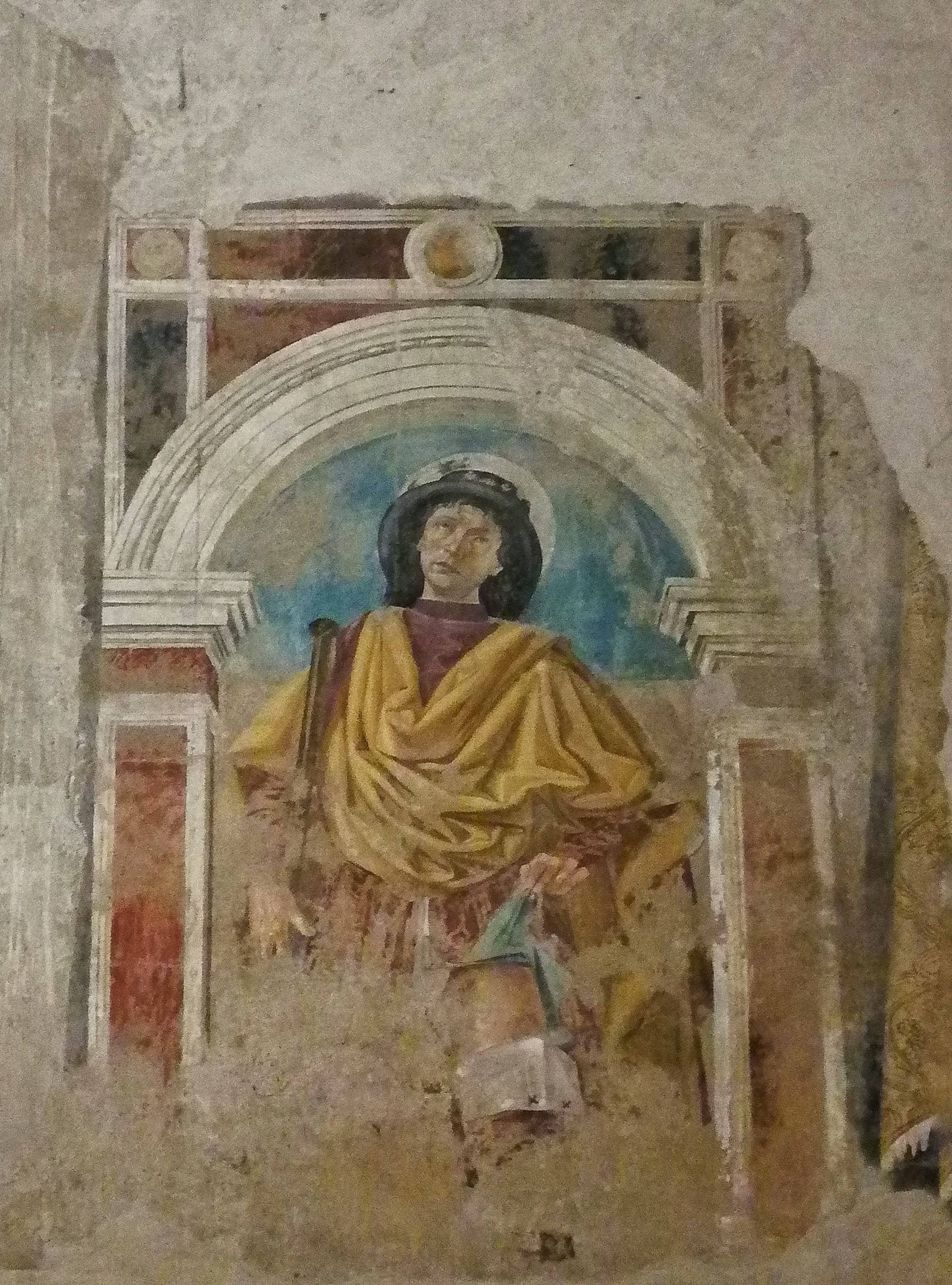 Bartolomeo della Gatta, frammento di affresco con San Rocco